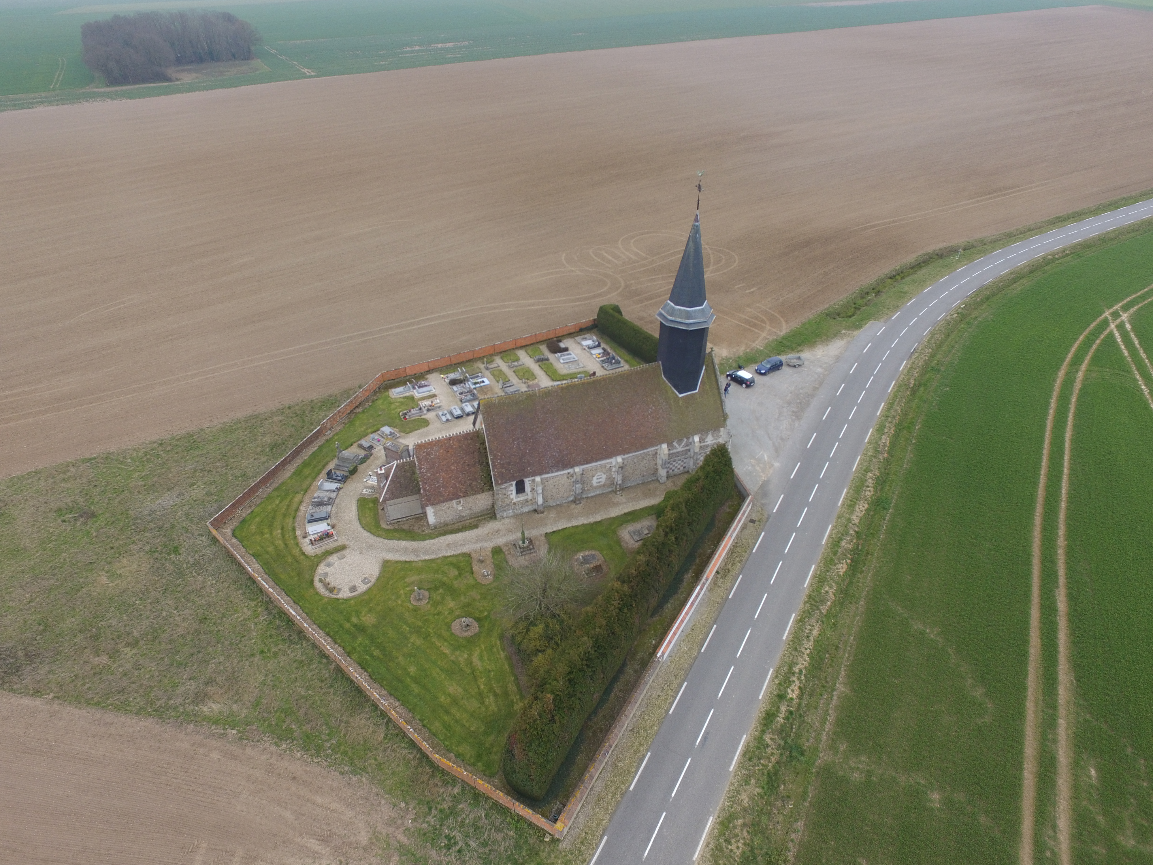 EGLISE DE LA COMMUNE HISTORIQUE DE SAINT DENIS DU BÉHÉLAN